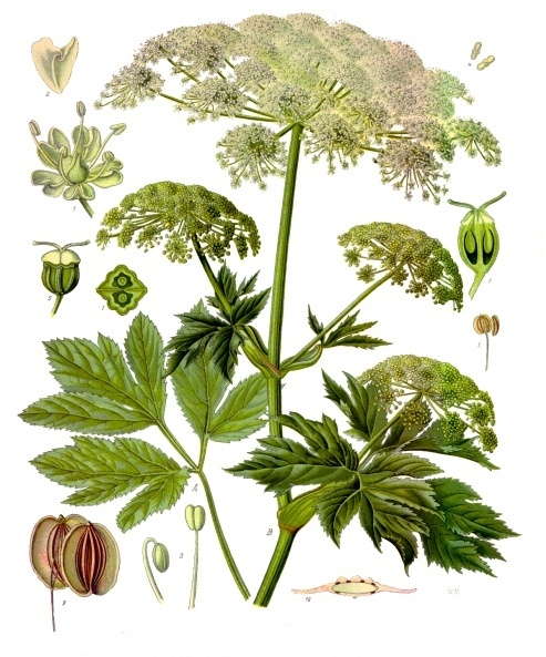 Meisterwurz. A Basalblatt, natürl. Grosse; B oberer Theil der blühenden Pflanze; 1 Blüthe, vergrössert; 2 Kronblatt, desgl.; 3 Staubgefässe, desgl.; 4 Pollen, desgl.; 5 Stempel, desgl.; 6 derselbe im Längsschnitt, desgl.; 7 Fruchtknoten im Querschnitt, desgl.; 8, 9 Frucht, beide Theilfrüchtchen getrennt, natürl. Grösse und vergrössert; 10 Theilfrüchtchen im Querschnitt, vergrössert.